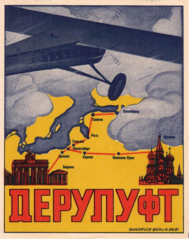 Информационная листовка «Дерулуфт».